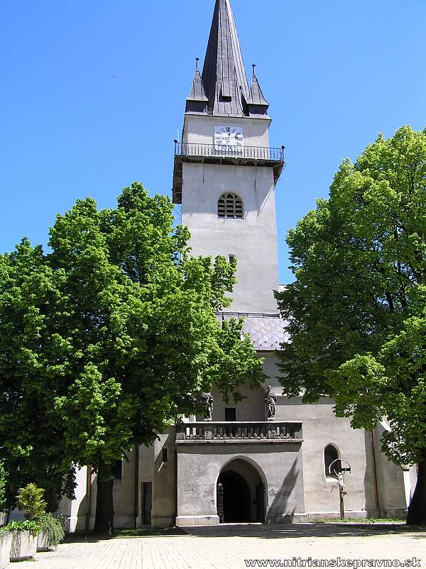 Kostol stojí v obci Nitrianske Pravno